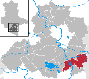 Leuna in Saxony-Anhalt - Saalekreis